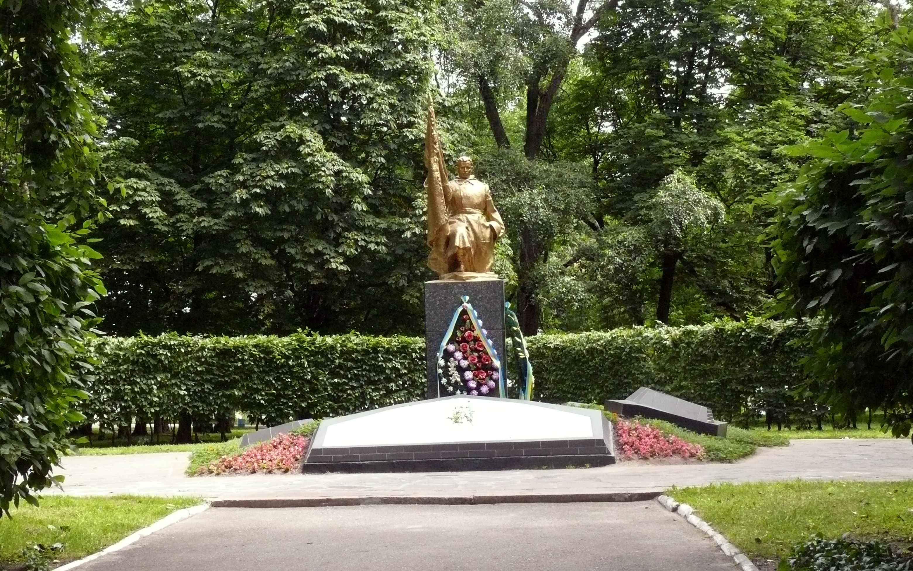 В Центральном парке культуры и отдыха им. М. Коцюбинского города Чернигова недалеко от перекрестка улицы Толстого и просп. Мира расположен памятник воинам, погибшим во время Великой отечественной войны. На белых гранитных плитах надпись: "Воины 181 Сталинградской, Ордена Ленина, Краснознаменной стрелковой дивизии, погибшие в боях за освобождение Чернигова 19–21 сентября 1943 г.". Далее идет список воинов офицерского и рядового состава. Чернигов. Украина.